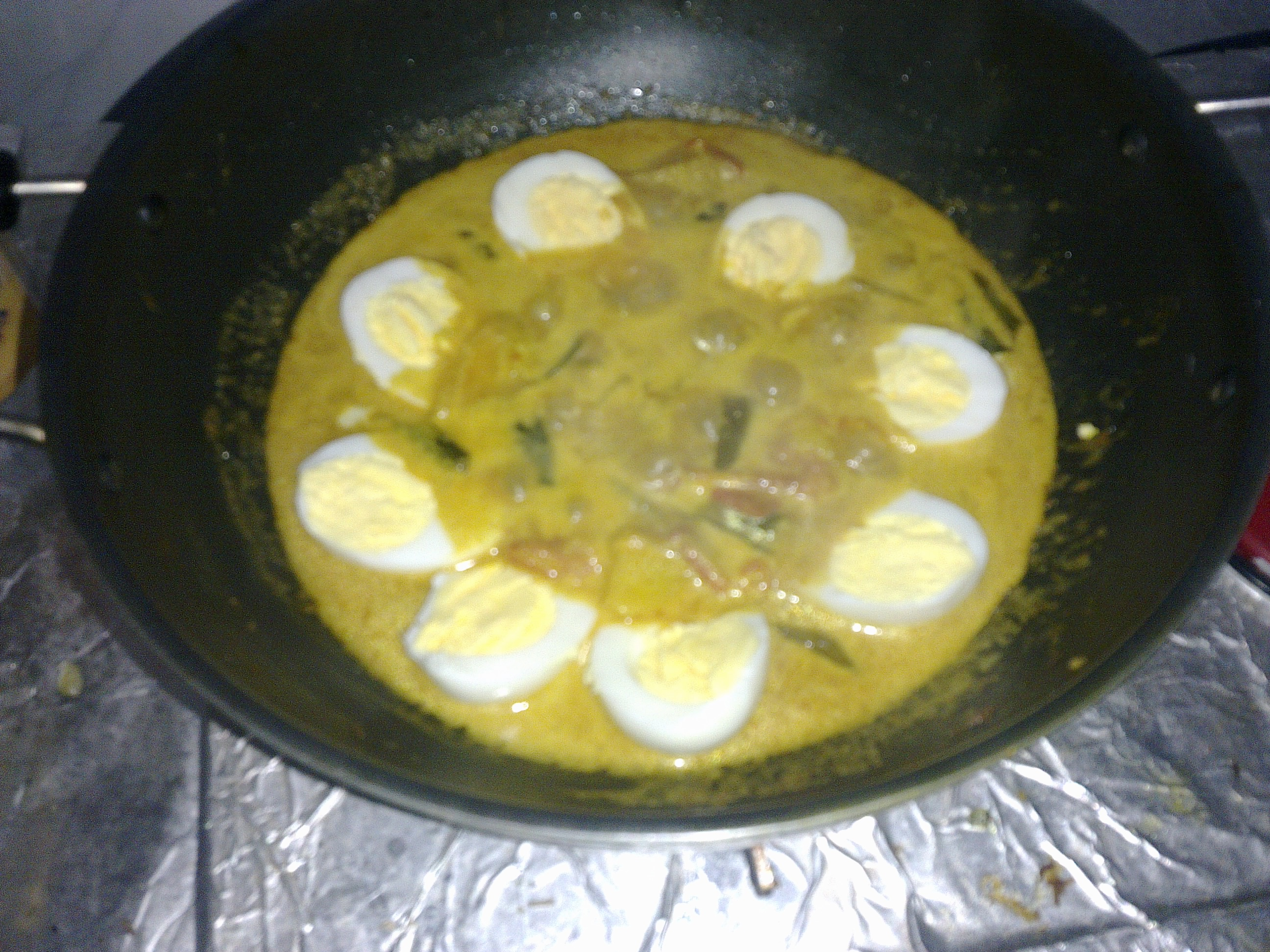 മുട്ടക്കറി.